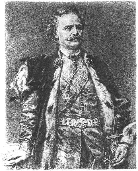 Stanisław Leszczyński. Pencil drawing by Jan Matejko, (1838-1893), a prominent Polish painter